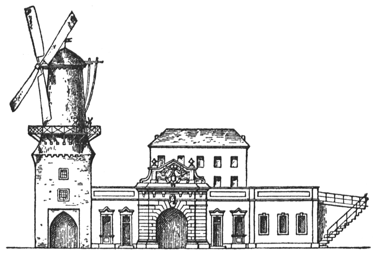 Ratinger Tor in Düsseldorf, nebst Windmühle auf dem älteren Tor